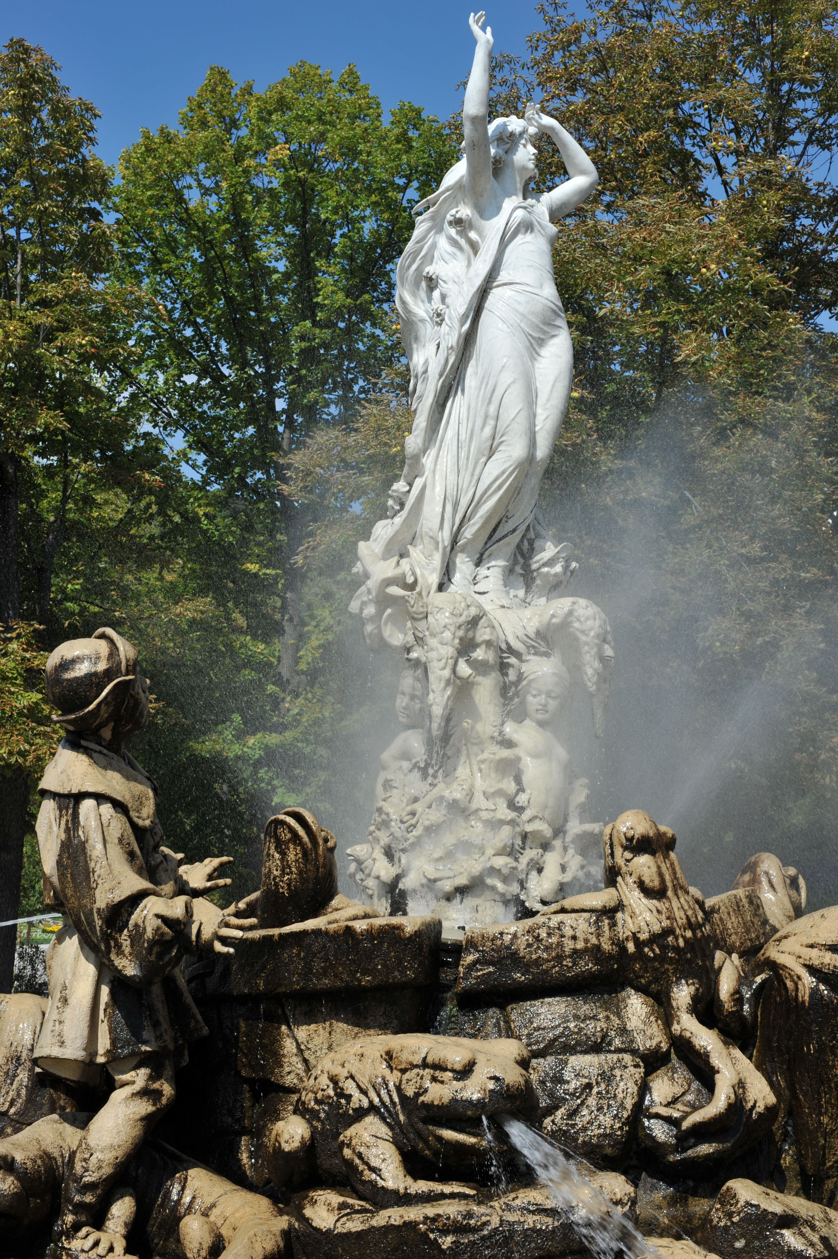 Bauten und Gartenbaudenkmäler im Badener Kurpark, Undine-Brunnen